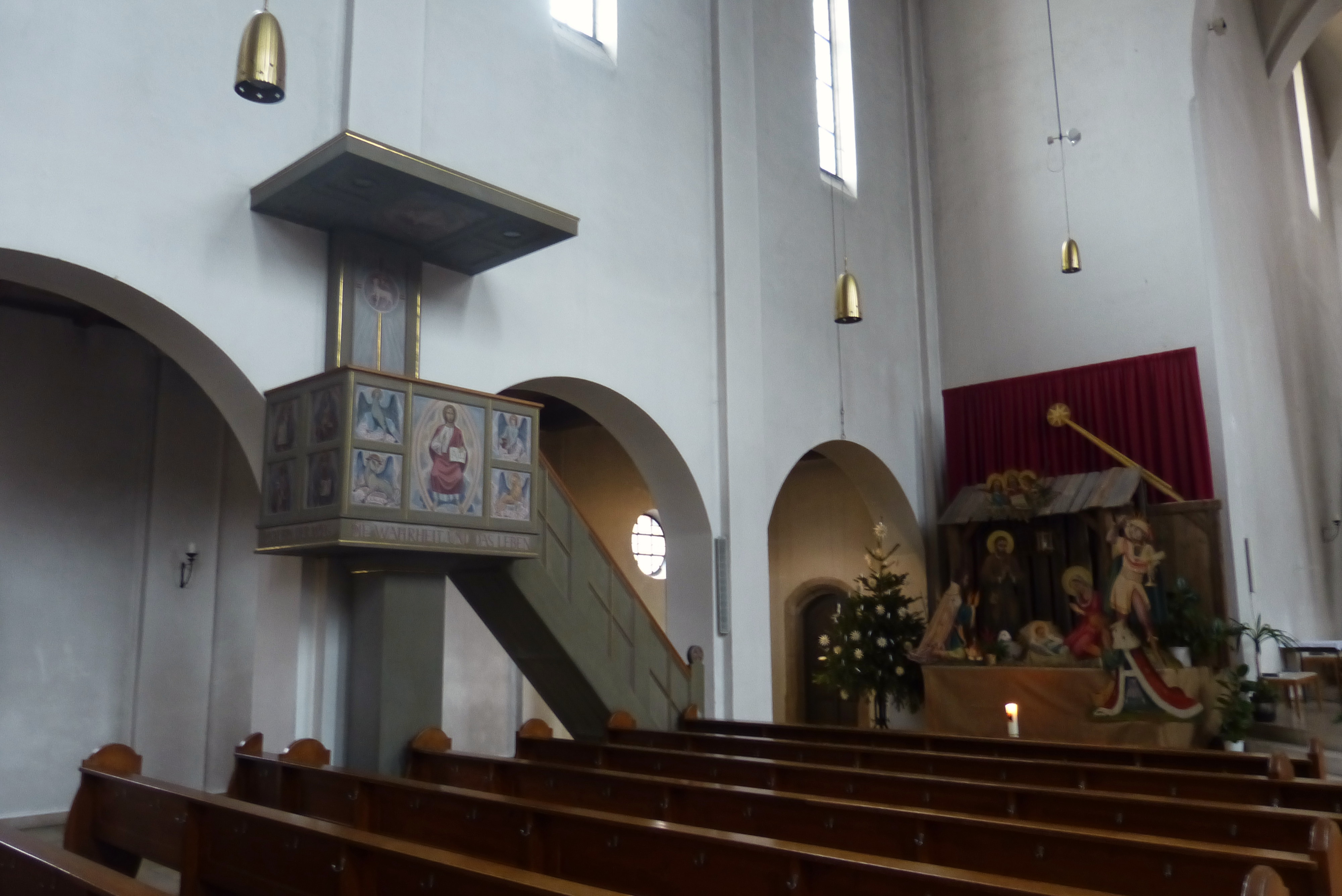 Kanzel, gestaltet von Karl Radinger, und Weihnachtskrippe in der Kirche Heiligste Dreifaltigkeit (Augsburg-Kriegshaber)